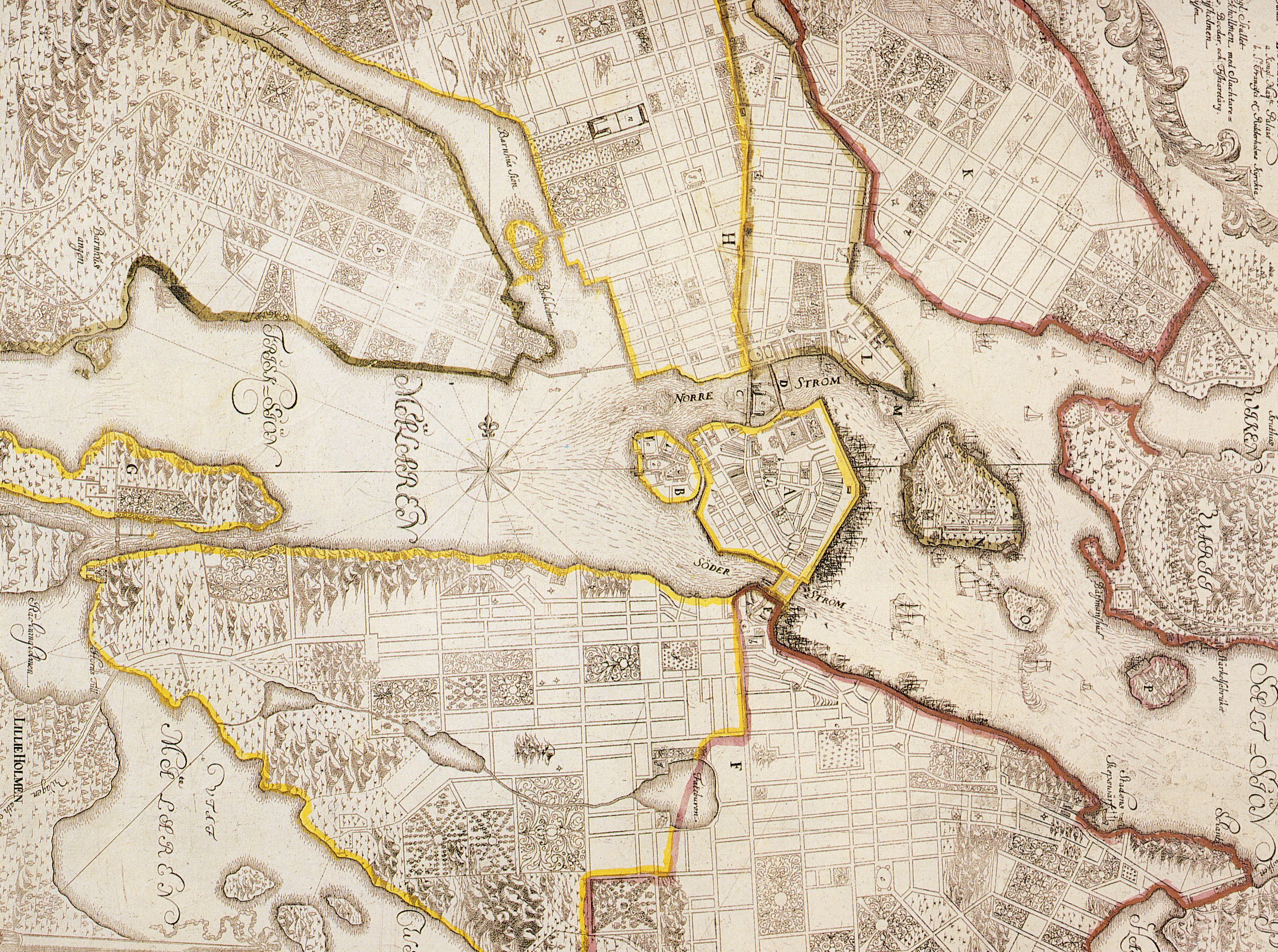 Werner von Rosenfeldts karta över Stockholm graverad av Anders Wijkman 1702